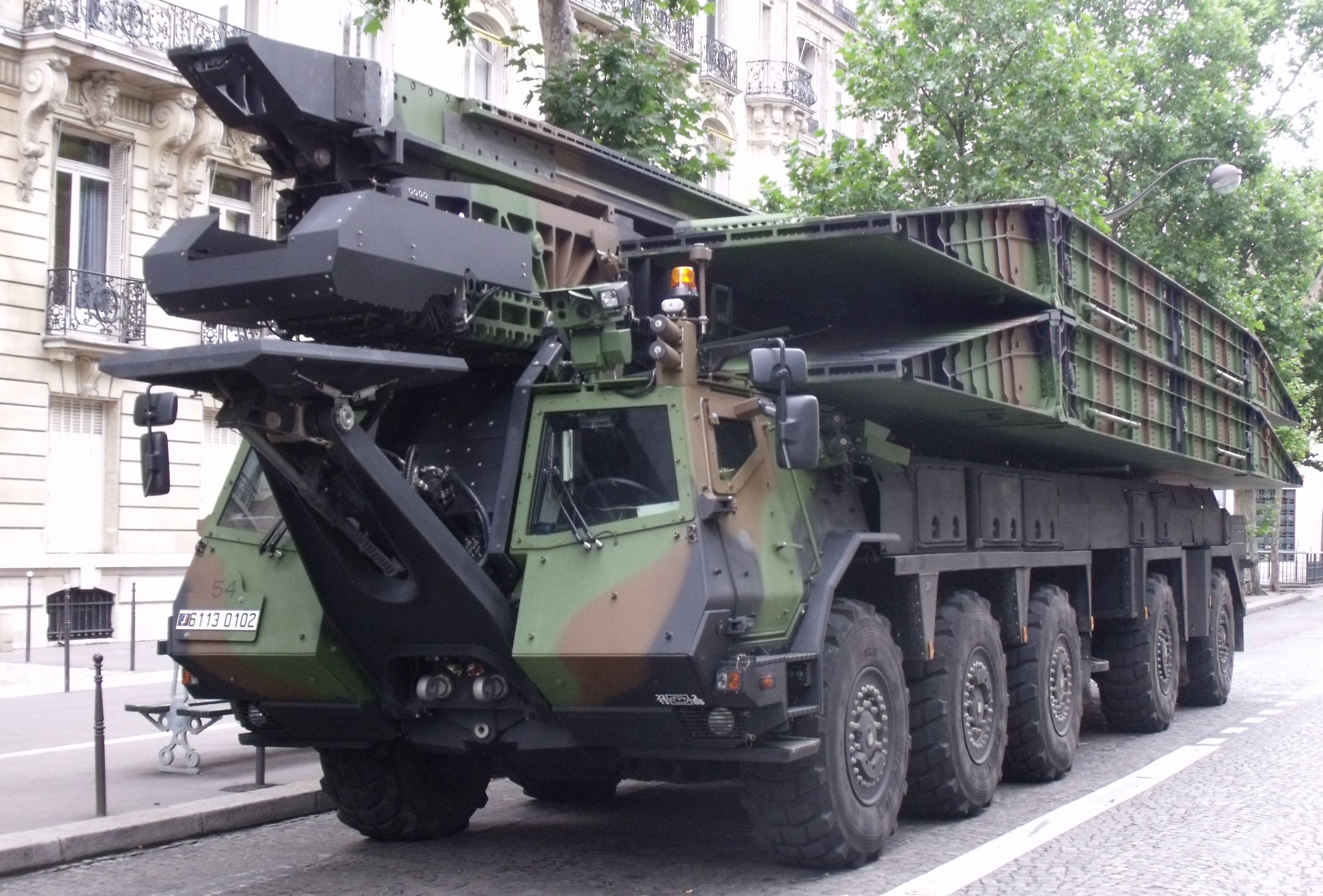 Le Système de Pose Rapide de Travures est vu ici en attente de défilé sur les Champs Elysées.